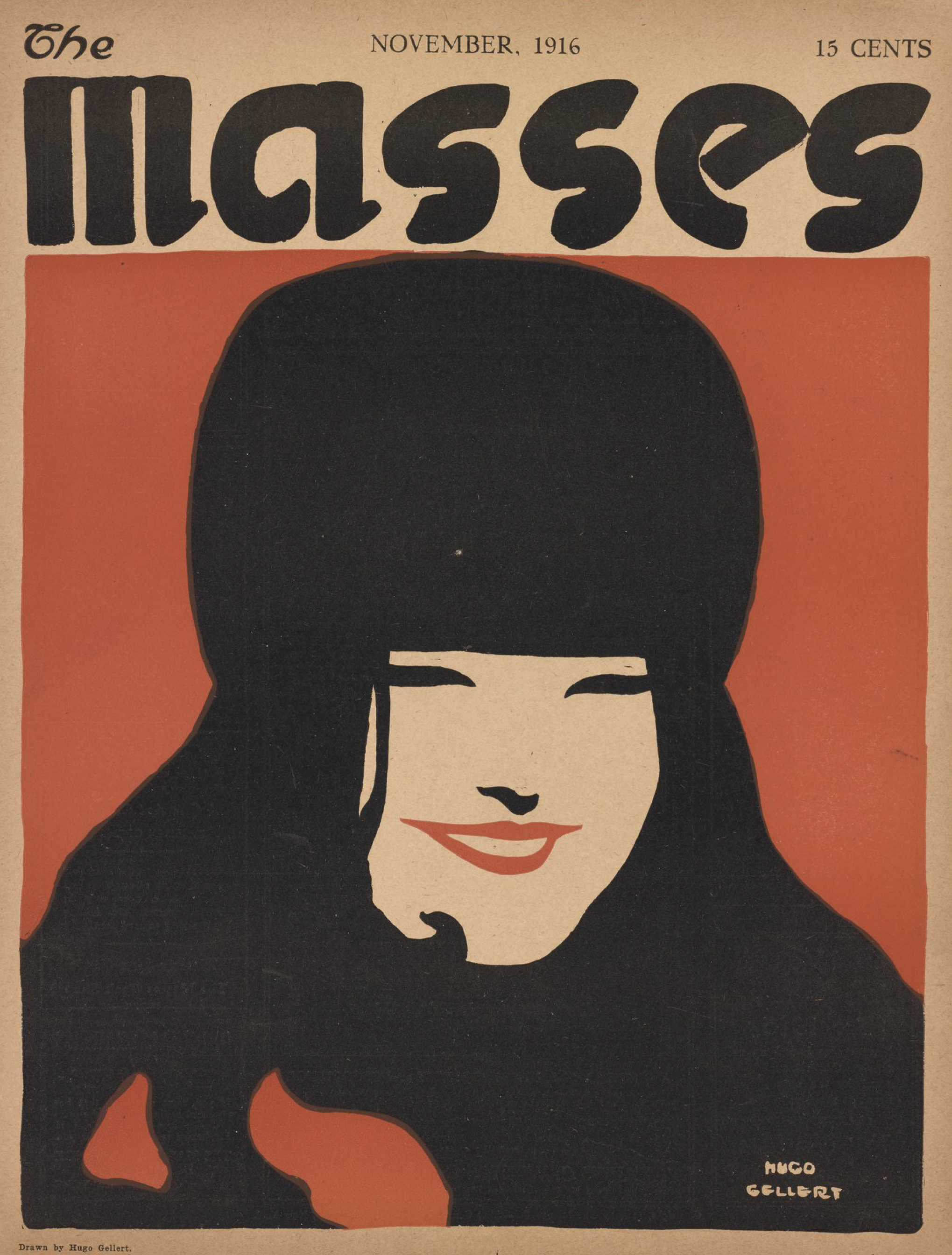 Número de noviembre de 1916 de The Masses.